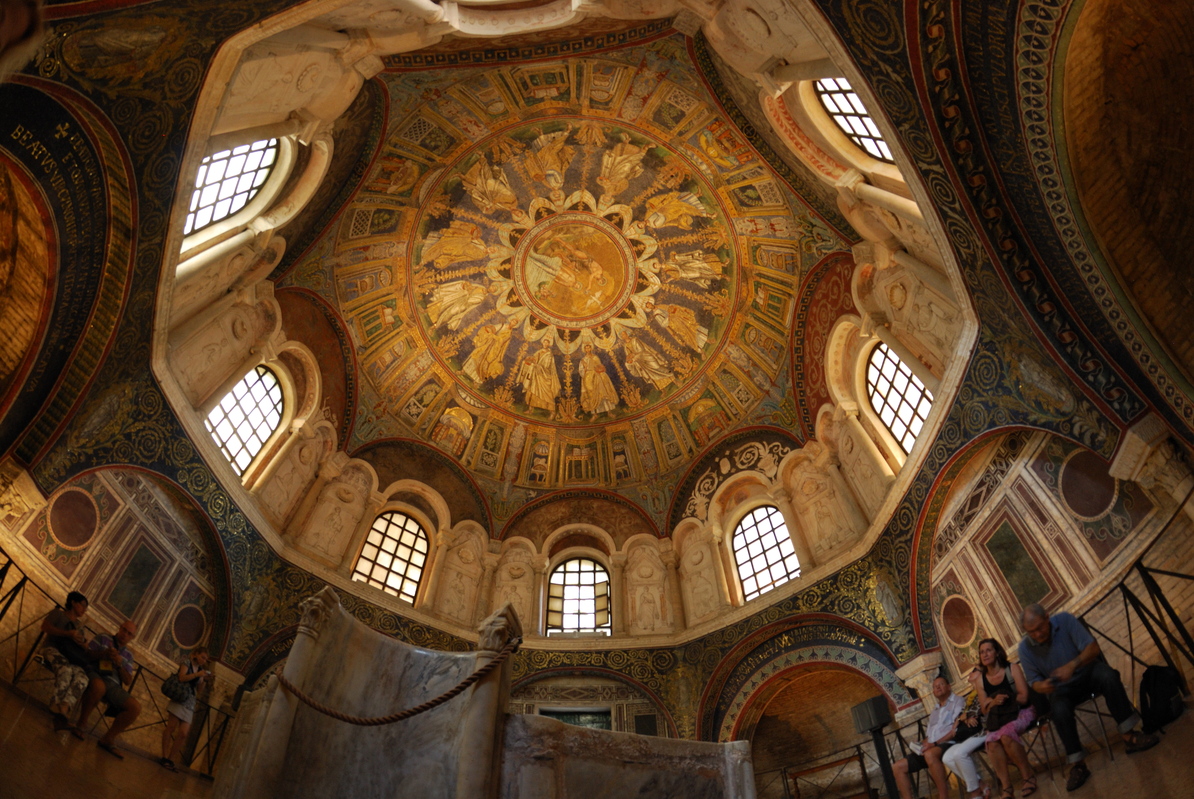 Battistero degli Ariani This is a photo of a monument which is part of cultural heritage of Italy.